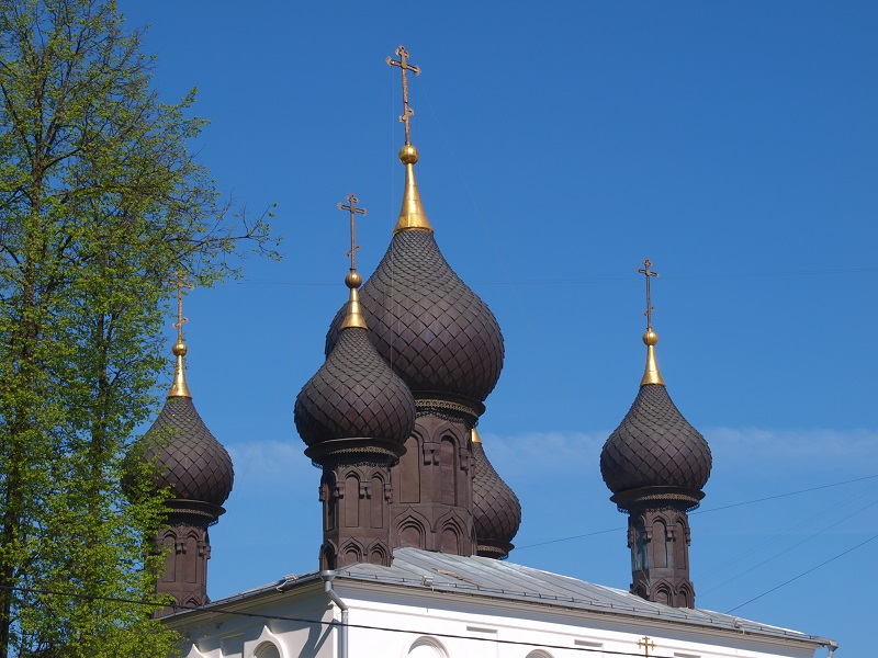 Купола Казанской церкви в Иванове